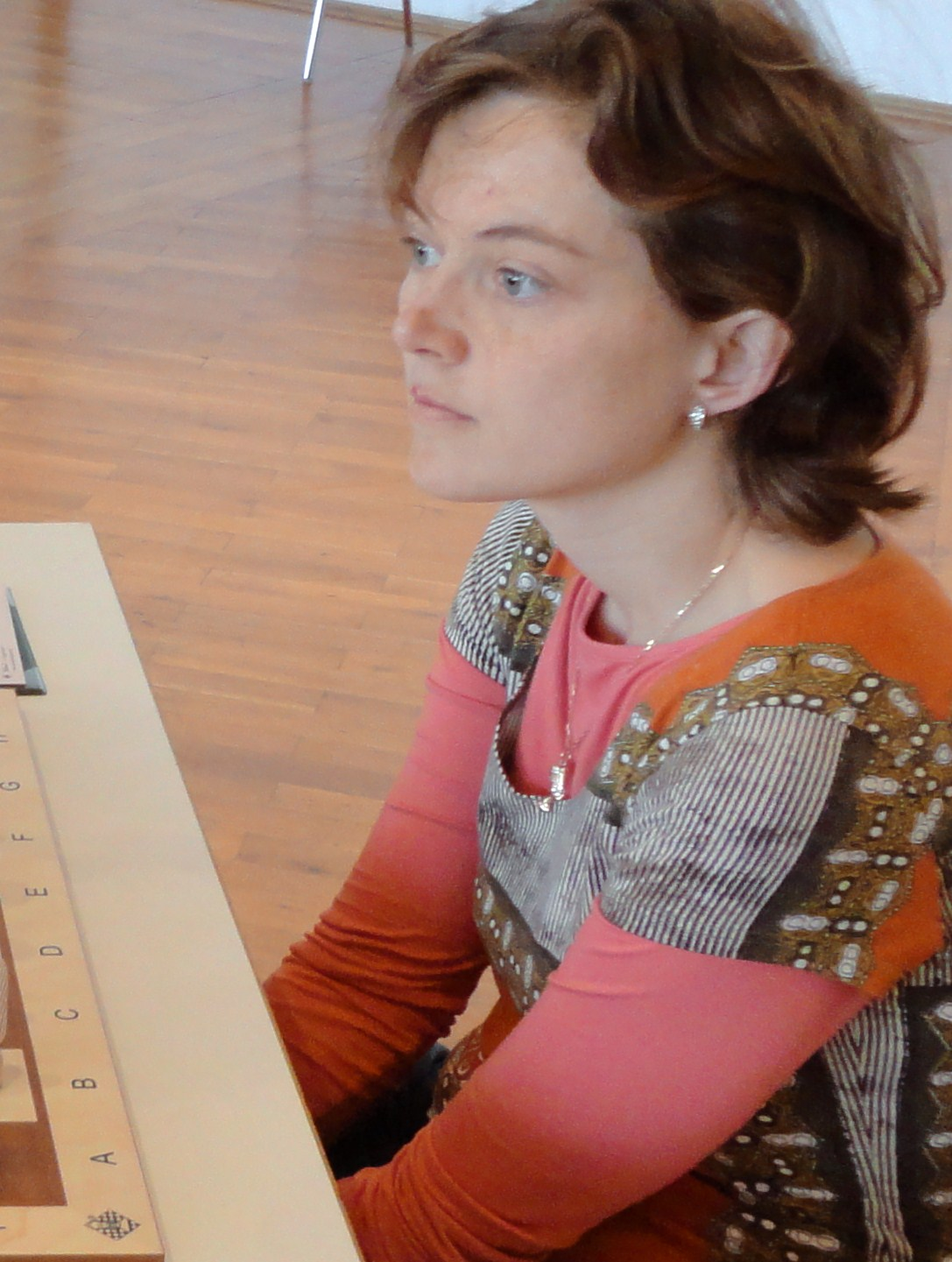 Martina Korenova, Finalrunden der Schachbundesliga der Frauen, Saison 2011/12 in Gladenbach.